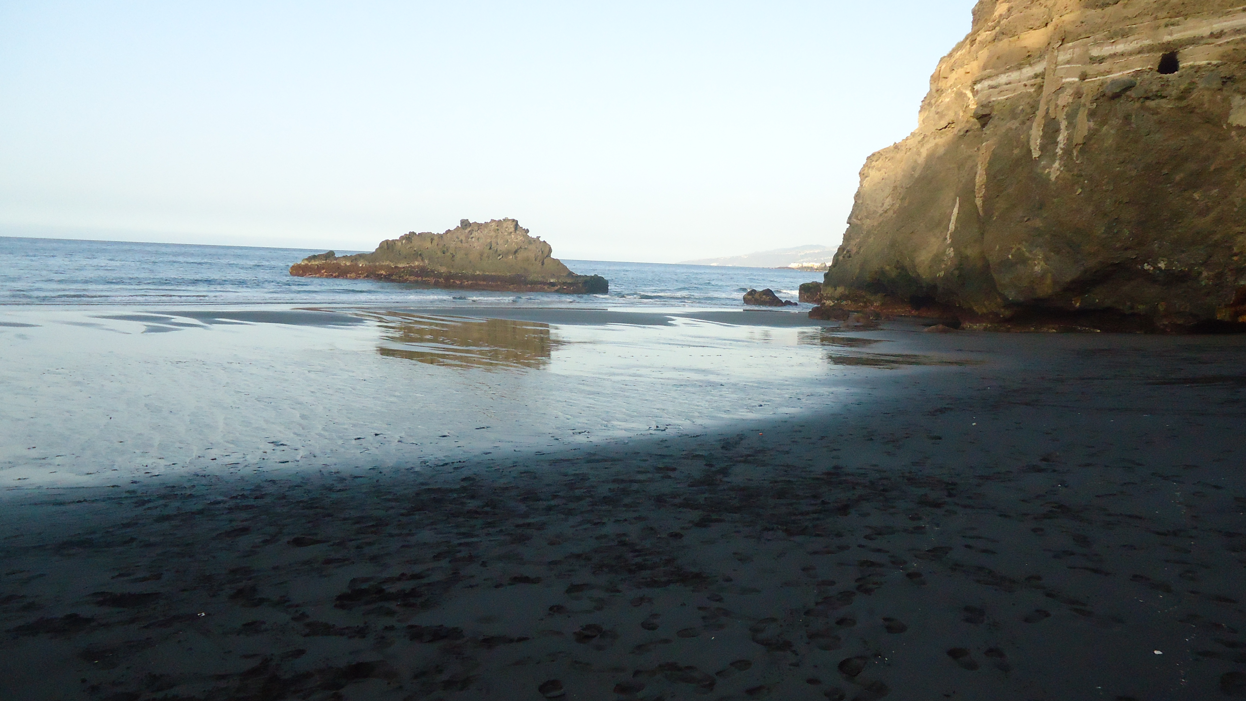 Piedra del Camello en la Playa de Castro, Los Realejos